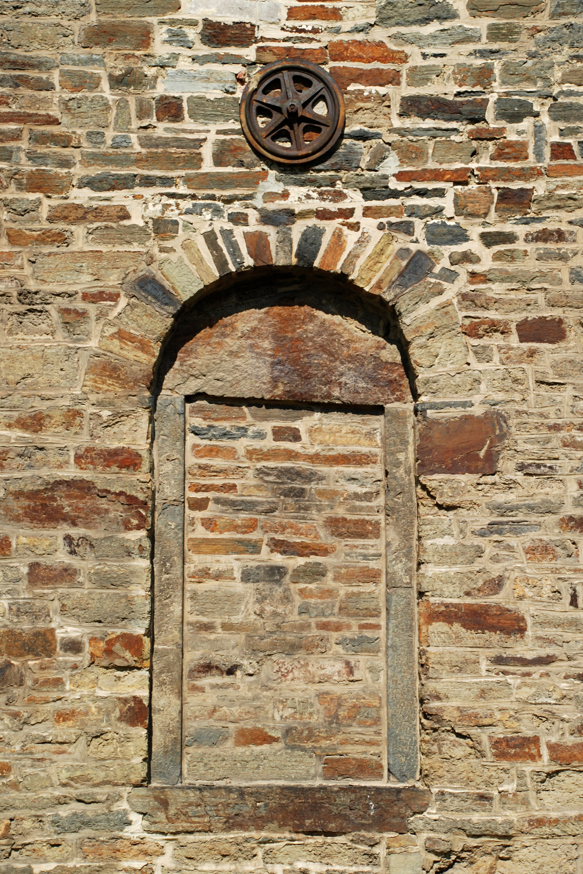 Belgique- Brabant wallon - Villers-la-Ville - ancien moulin abbatial